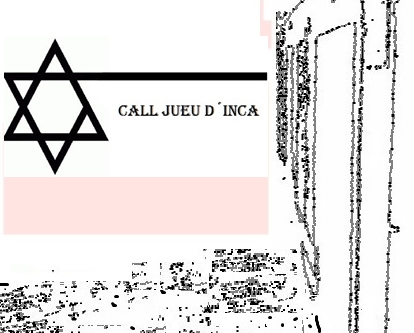 logo call jueu inca, logo barrio judío inca